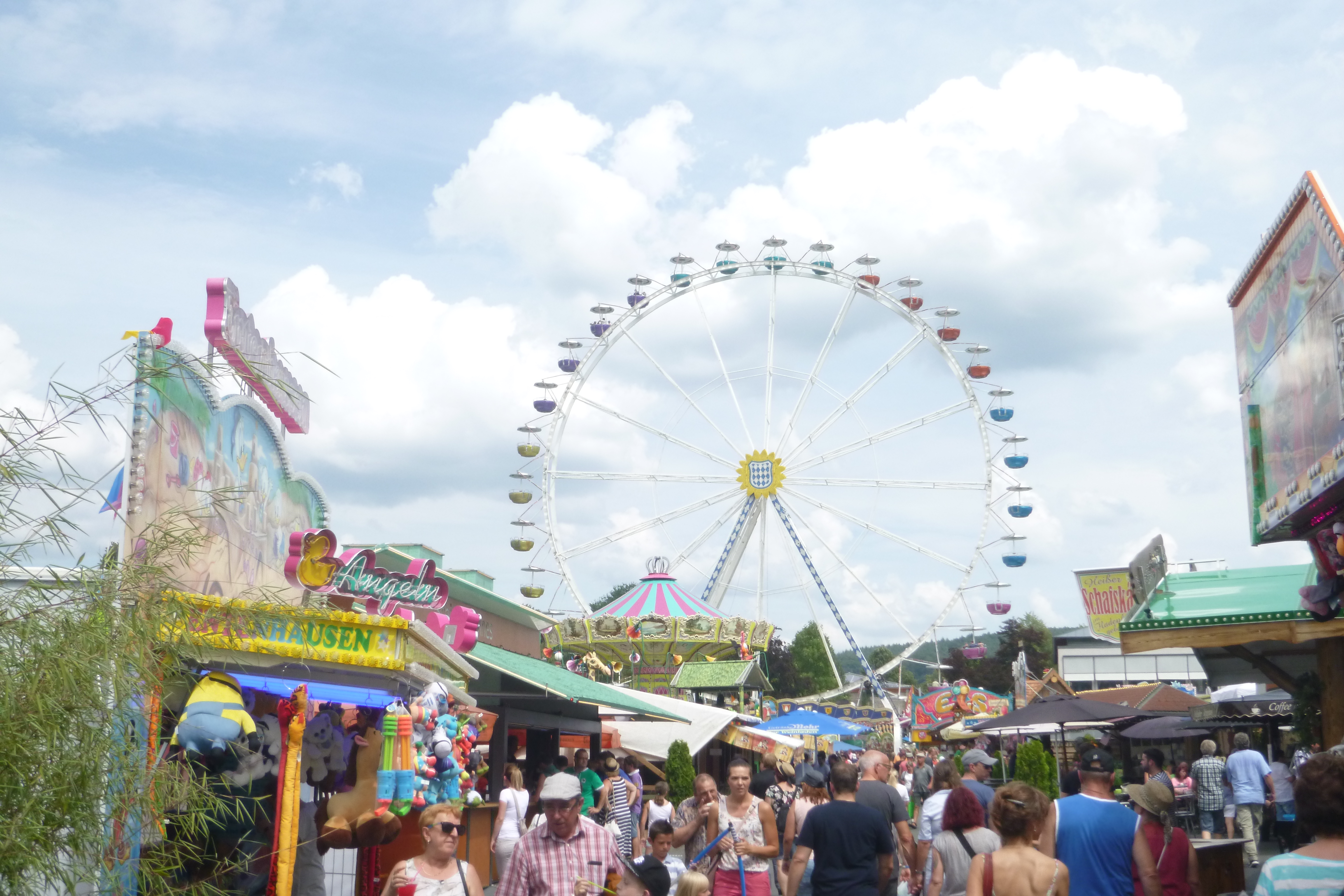 Foirejo Wiesenmarkt en Erbach (Germanio)